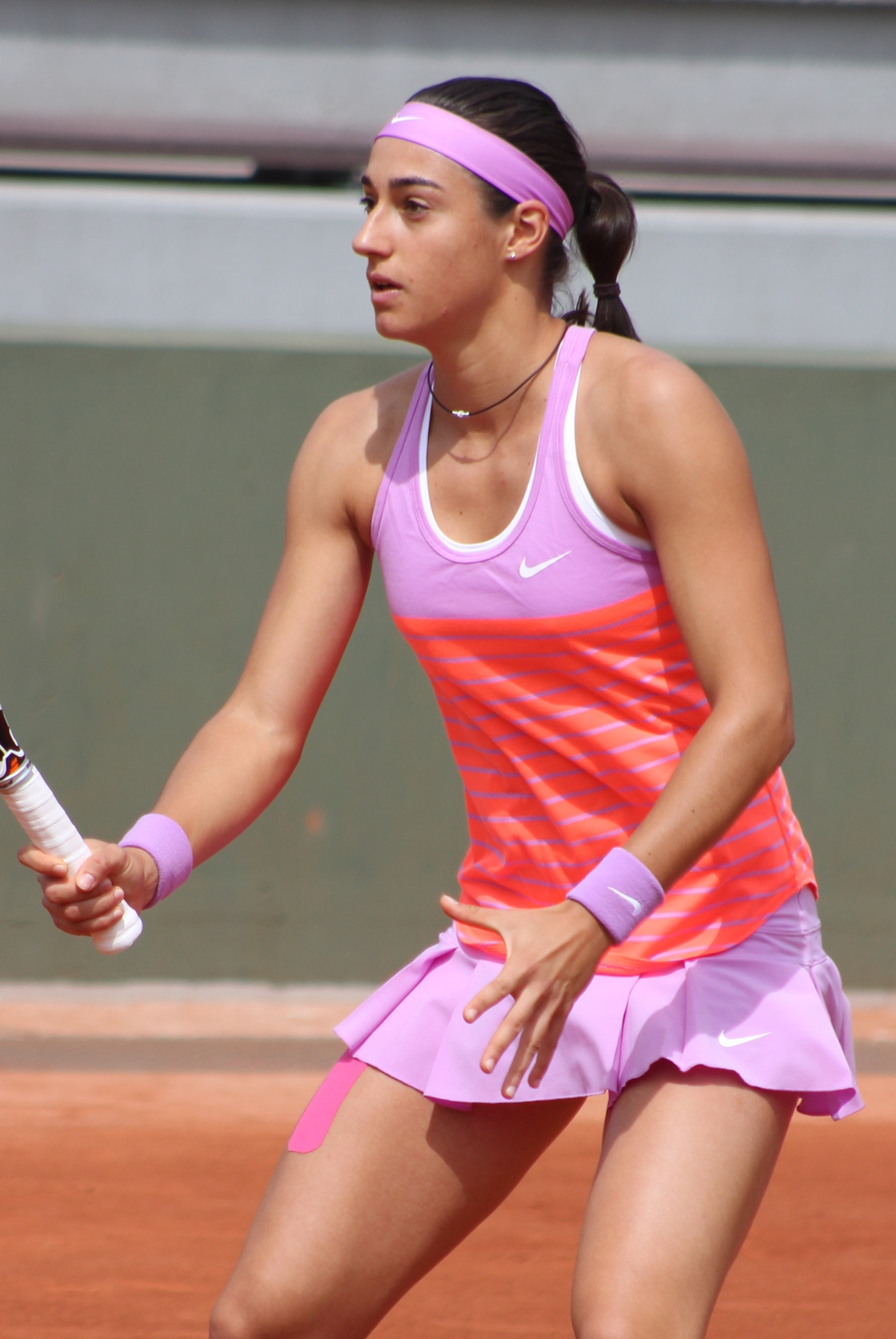 Garcia RG15 (11)